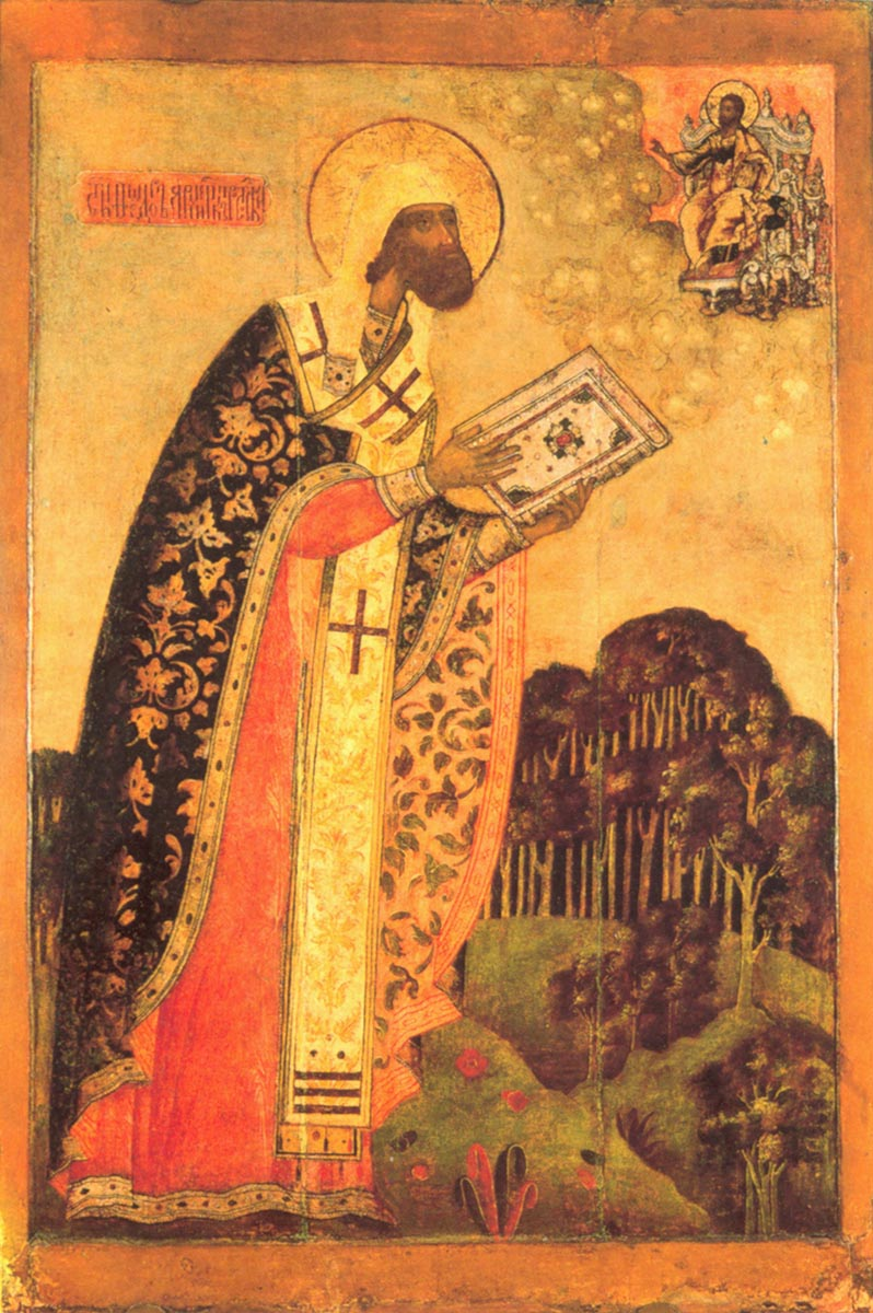 Икона из собора Рождества Богородицы г. Ростова.